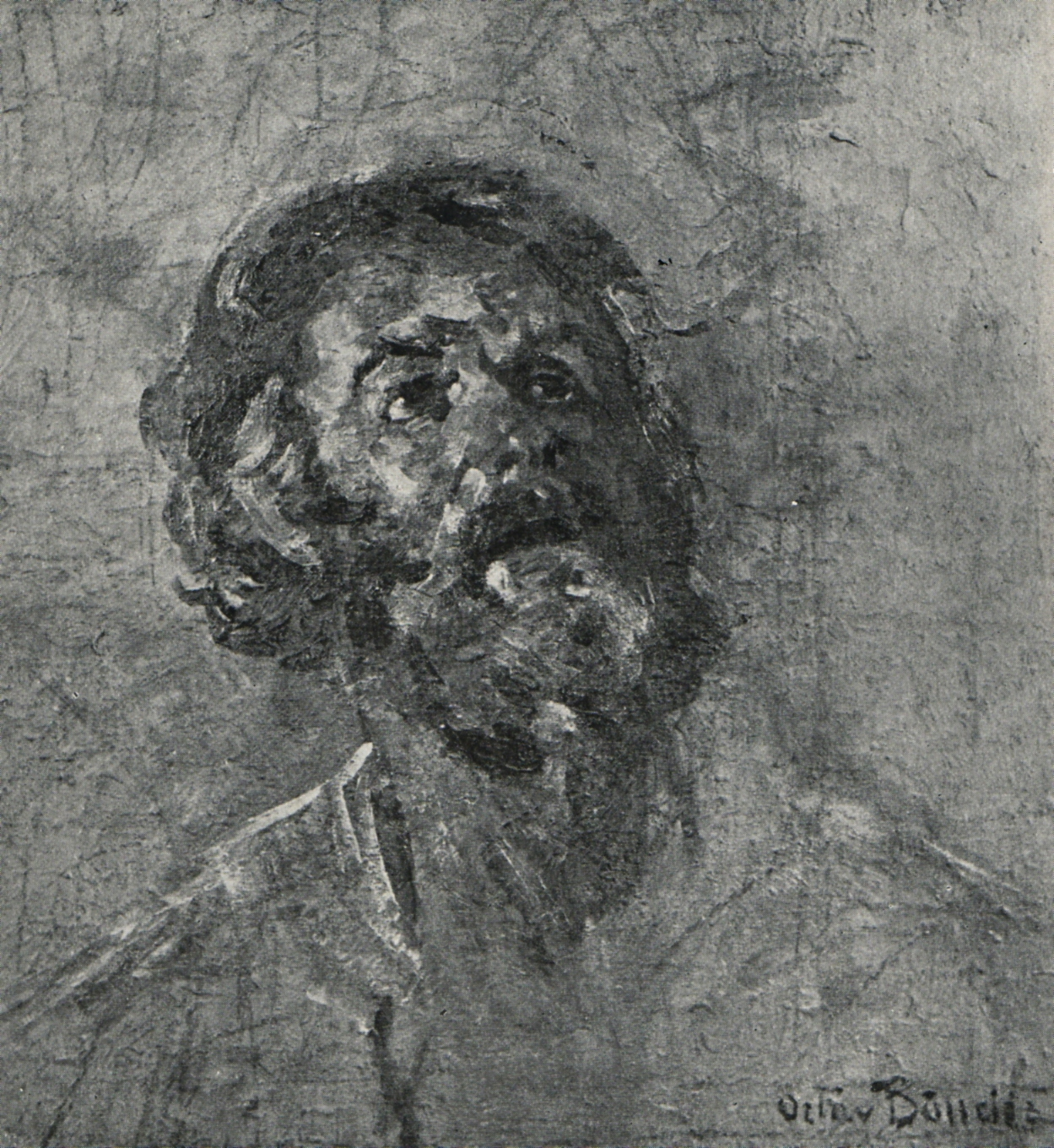 Cap de țăran răsculat (studiu)